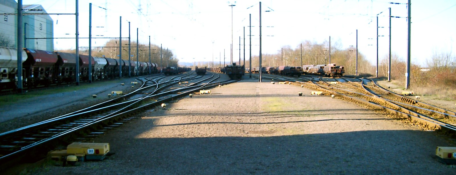 Sujet: Triage Péiteng; Source: Eege Foto vum Pecalux